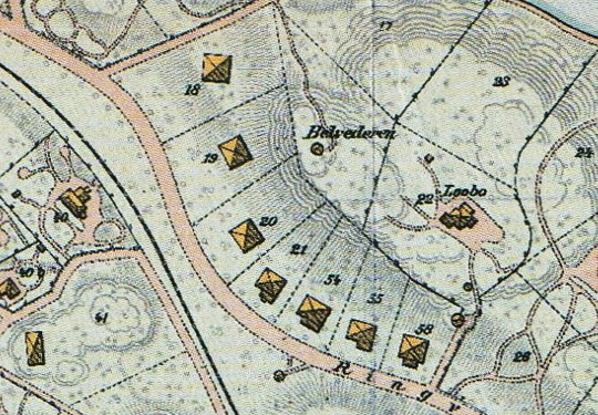 Tomtkarta över Sjuvillorna, 1896